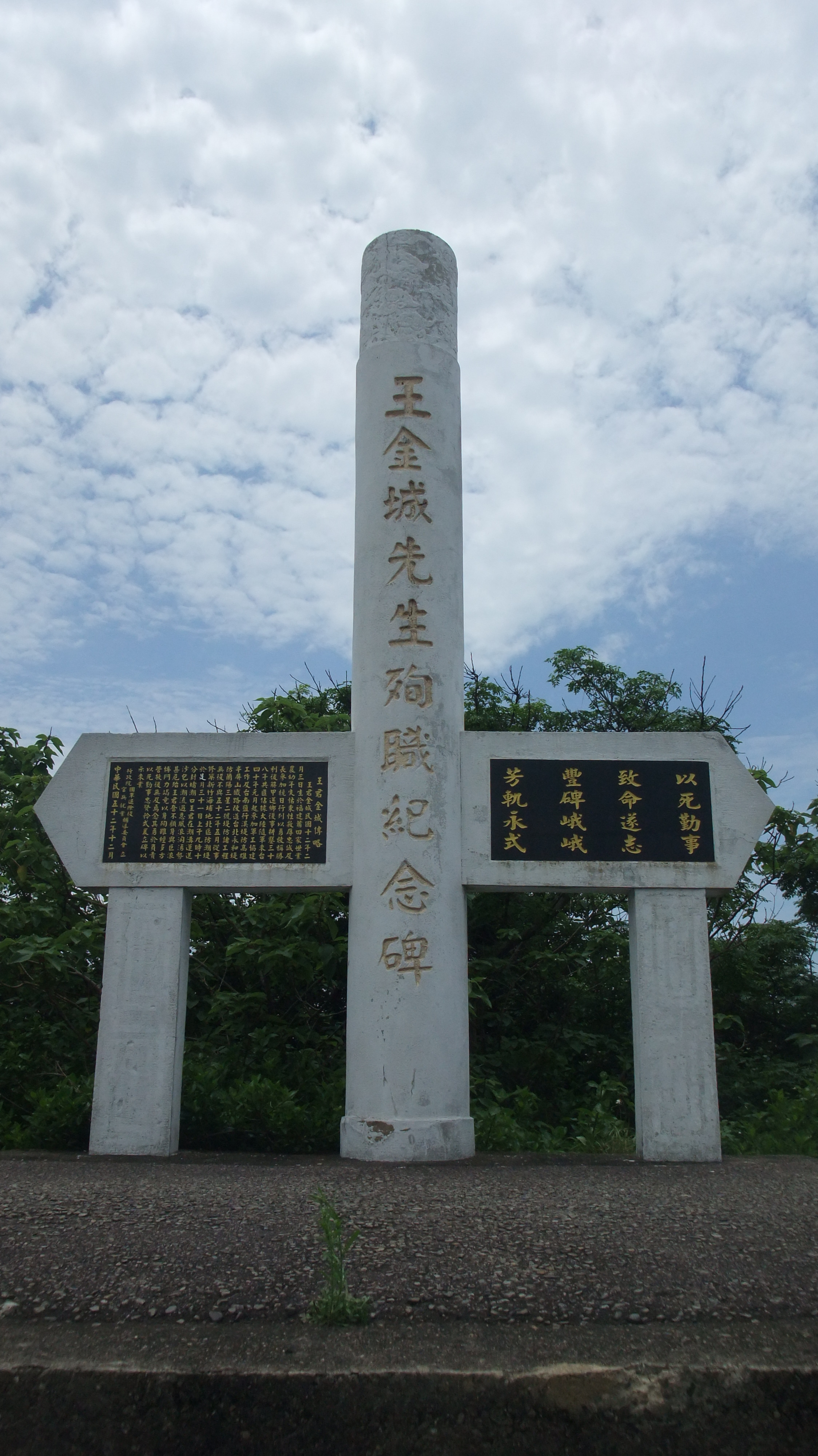 中文（台灣）: 王金城先生殉職紀念碑